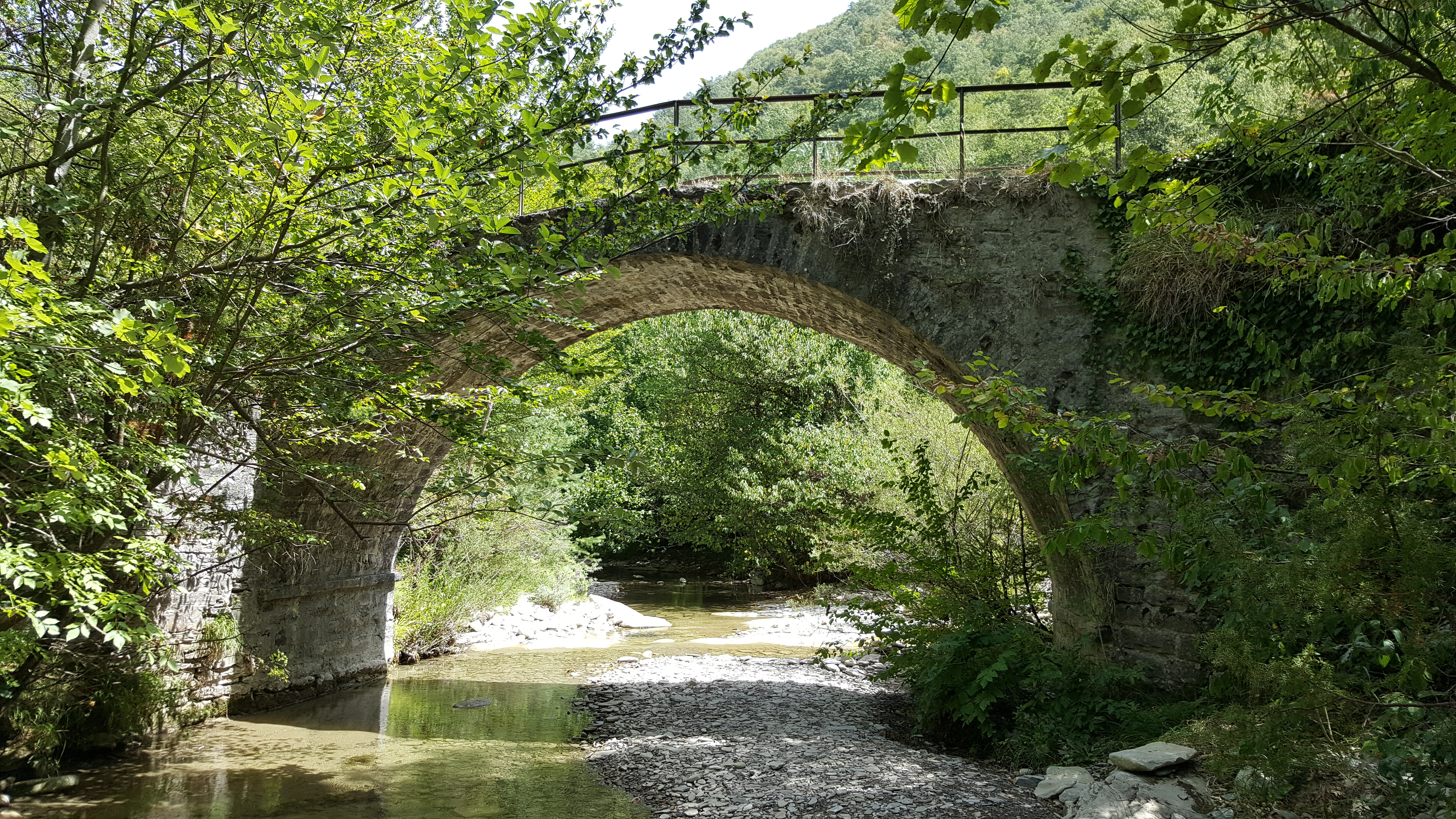 Podere Nasseto This is a photo of a monument which is part of cultural heritage of Italy.